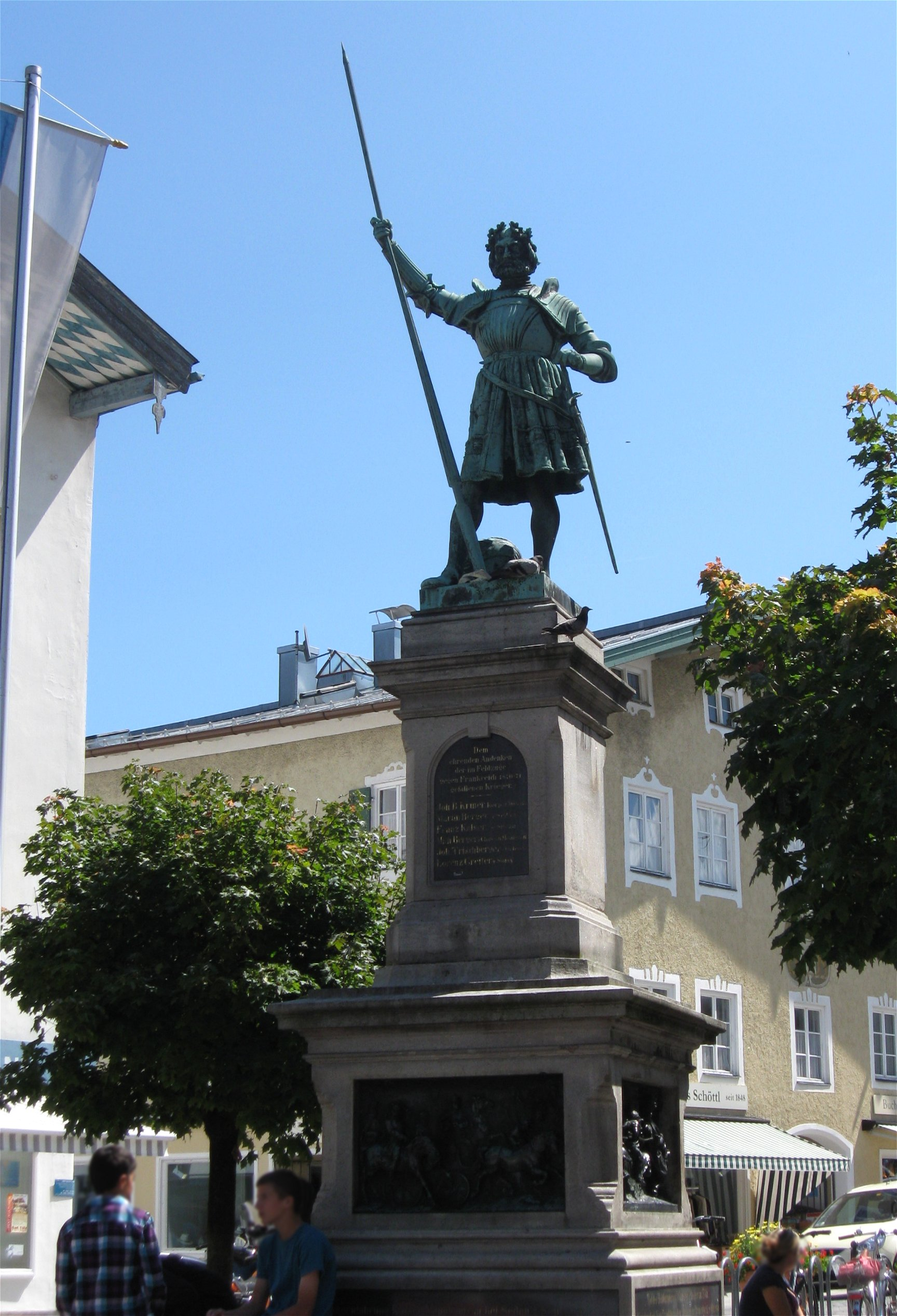 Winzerer-Denkmal,Denkmal und Kriegergedächtnisstätte, sog. Winzerer-Denkmal, bronzene Gussfigur auf hohem Steinsockel mit vier Bronzerelieftafeln, von Ferdinand von Miller d.J., 1887, zugleich Kriegerdenkmal für die Gefallenen von 1870/71, Bad Tölz